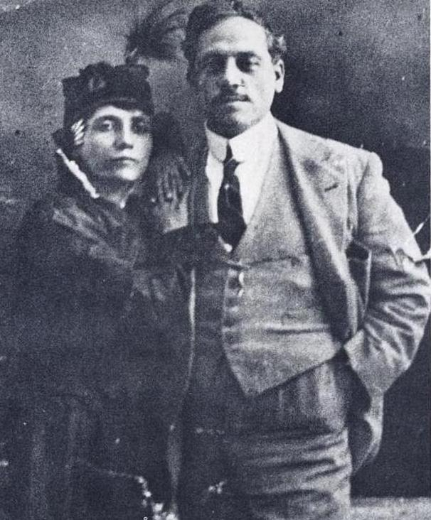 Nicola ed Elvira Notari (anni 1920) Foto tratta da Kinomata. La donna nel cinema, a cura di Annabella Miscuglio e Roni Daoupulo, Dedalo Libri, 1980